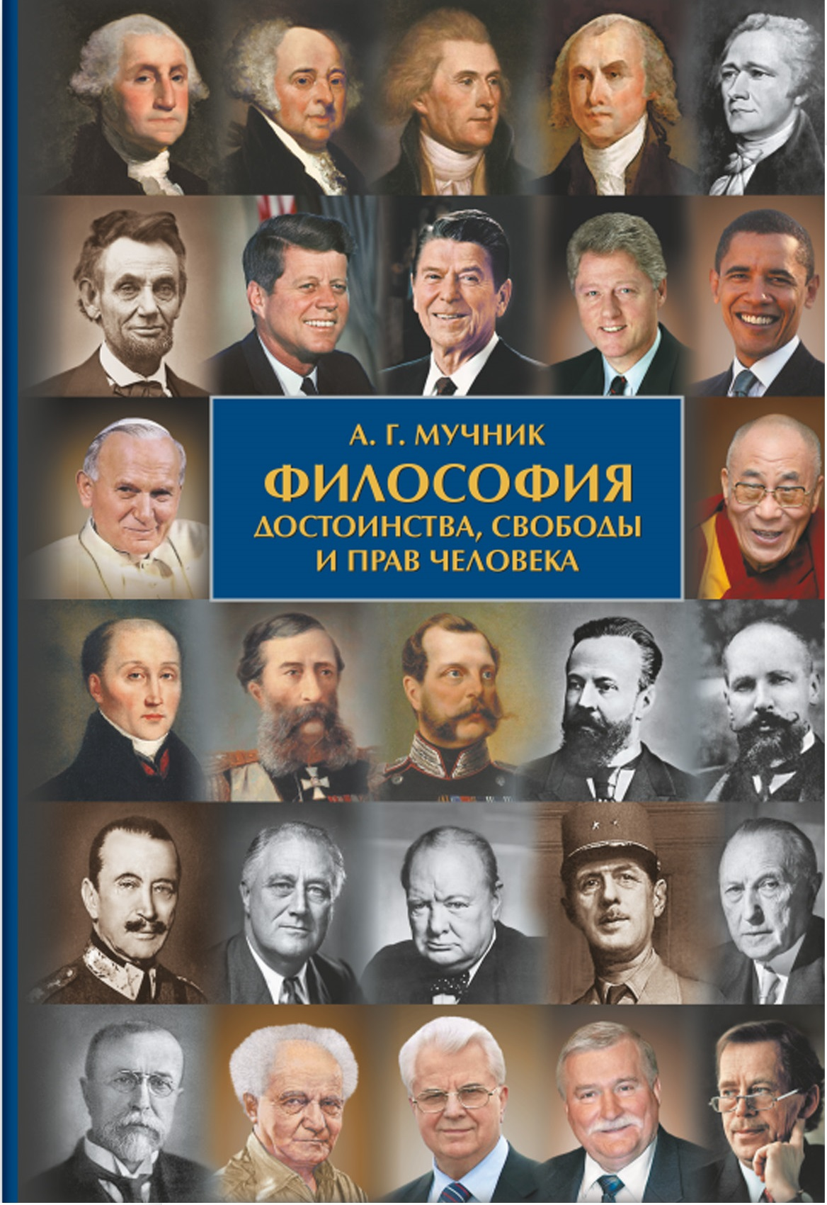 Философия1